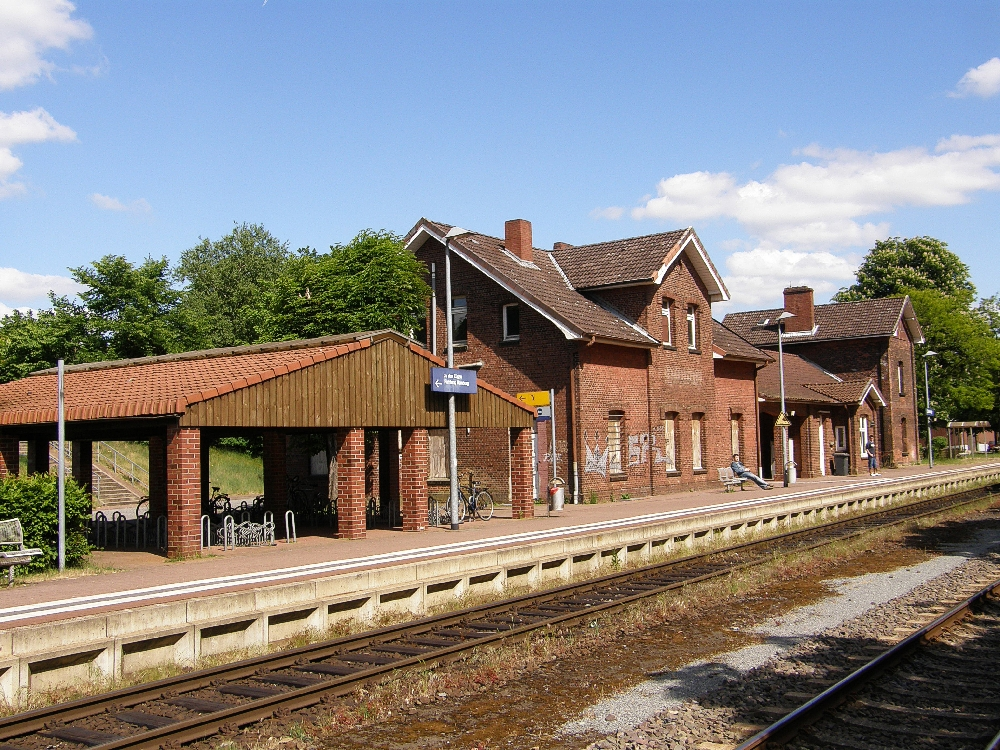 Der Bahnhof ist Cadenberge